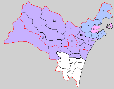 宮城県宮城郡の町村。